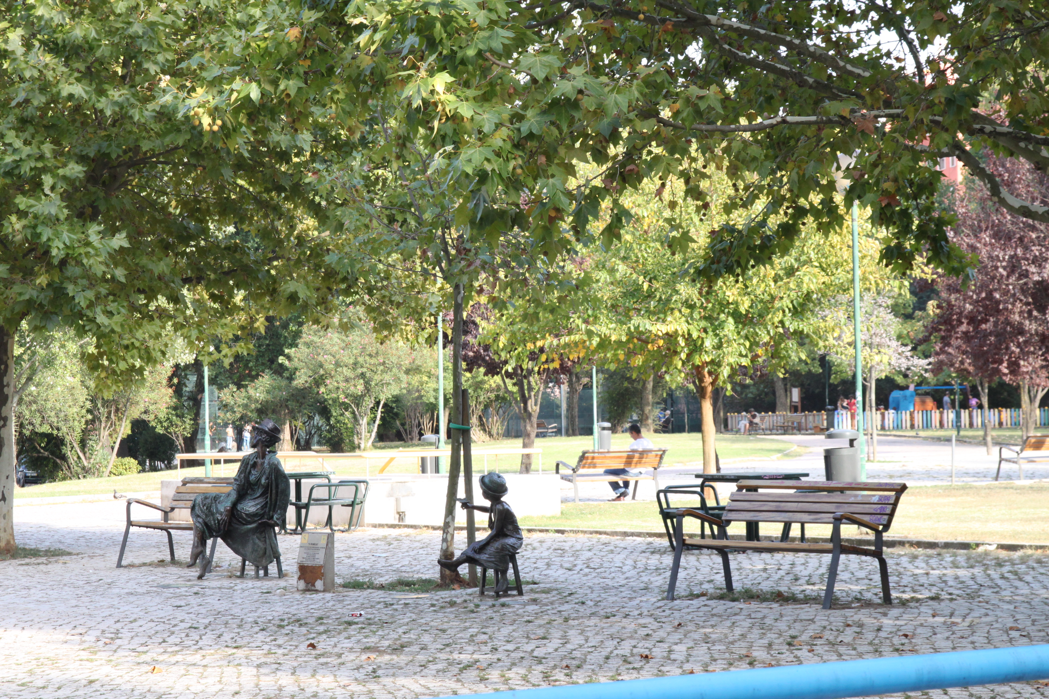 Jardim Fernando Pessa This file was uploaded for Wiki Loves Monuments in Portugal with the unique identifier 97026711.